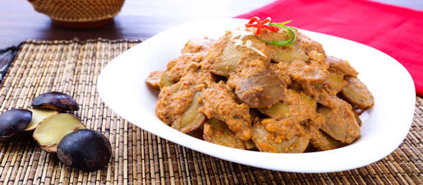 Semur Jengkol